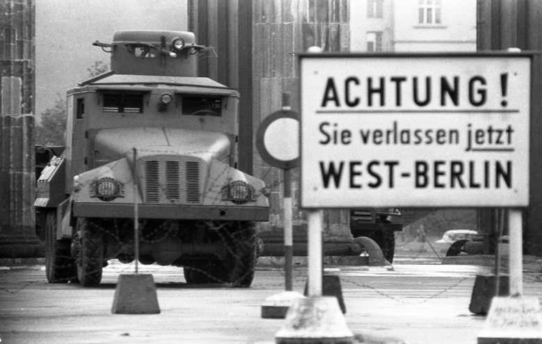 Berlin.- Wasserwerfer am Brandenburger Tor, davor ein Hinweisschild "Achtung! Sie verlassen jetzt West-Berlin" Information added by Wikimedia users.